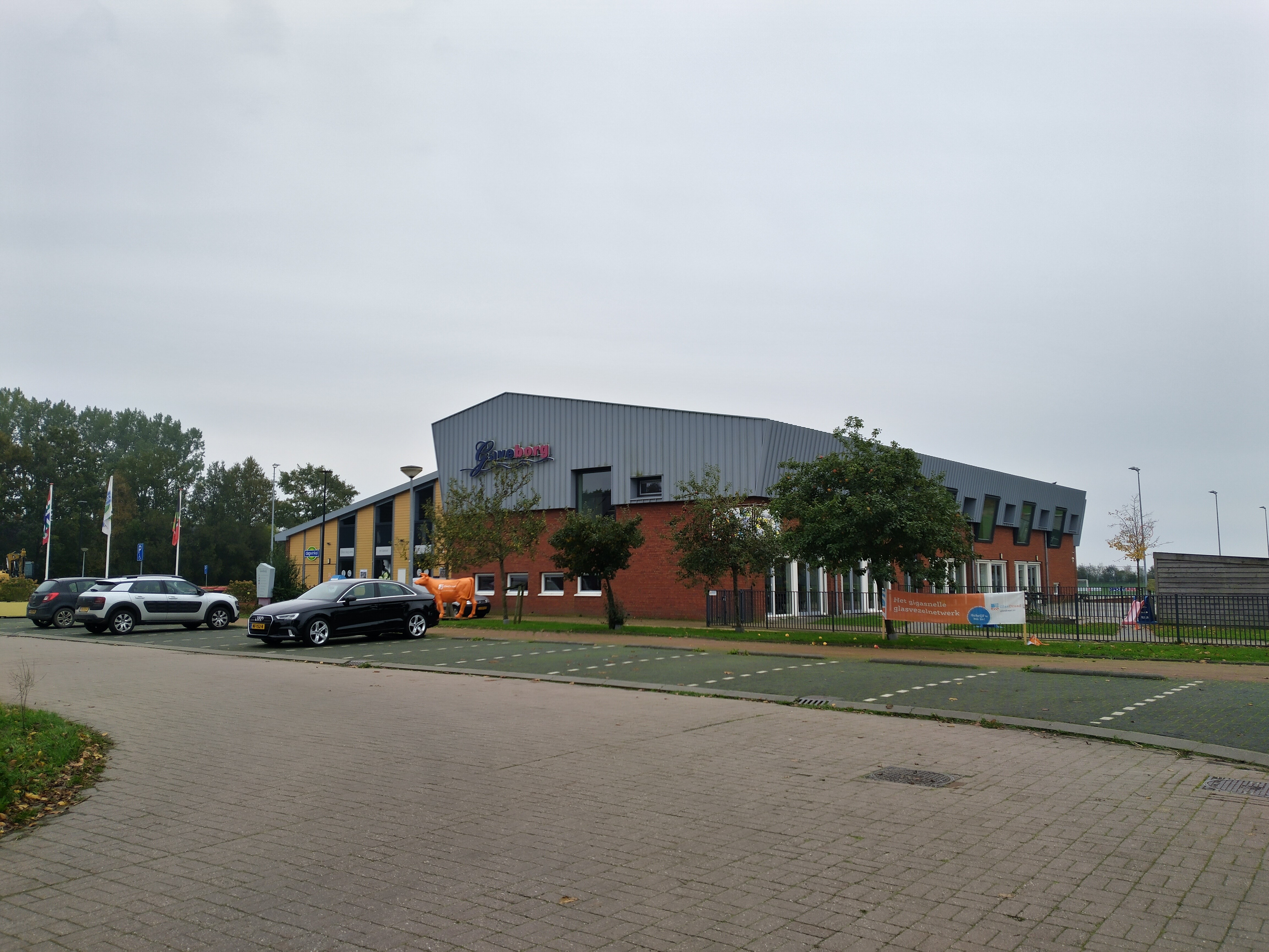 Multifunctioneel Centrum De Gaveborg te Oostwold, Westerkwartier, Groningen.